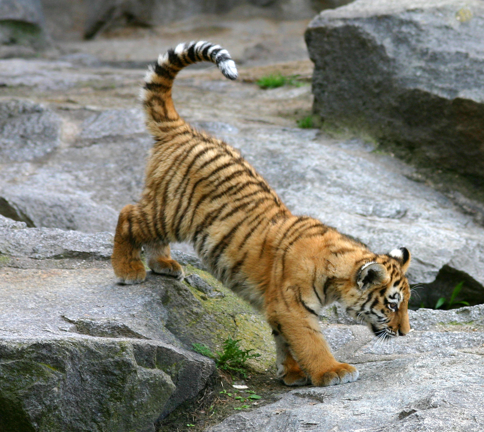 Tiger in Berlin Tierpark